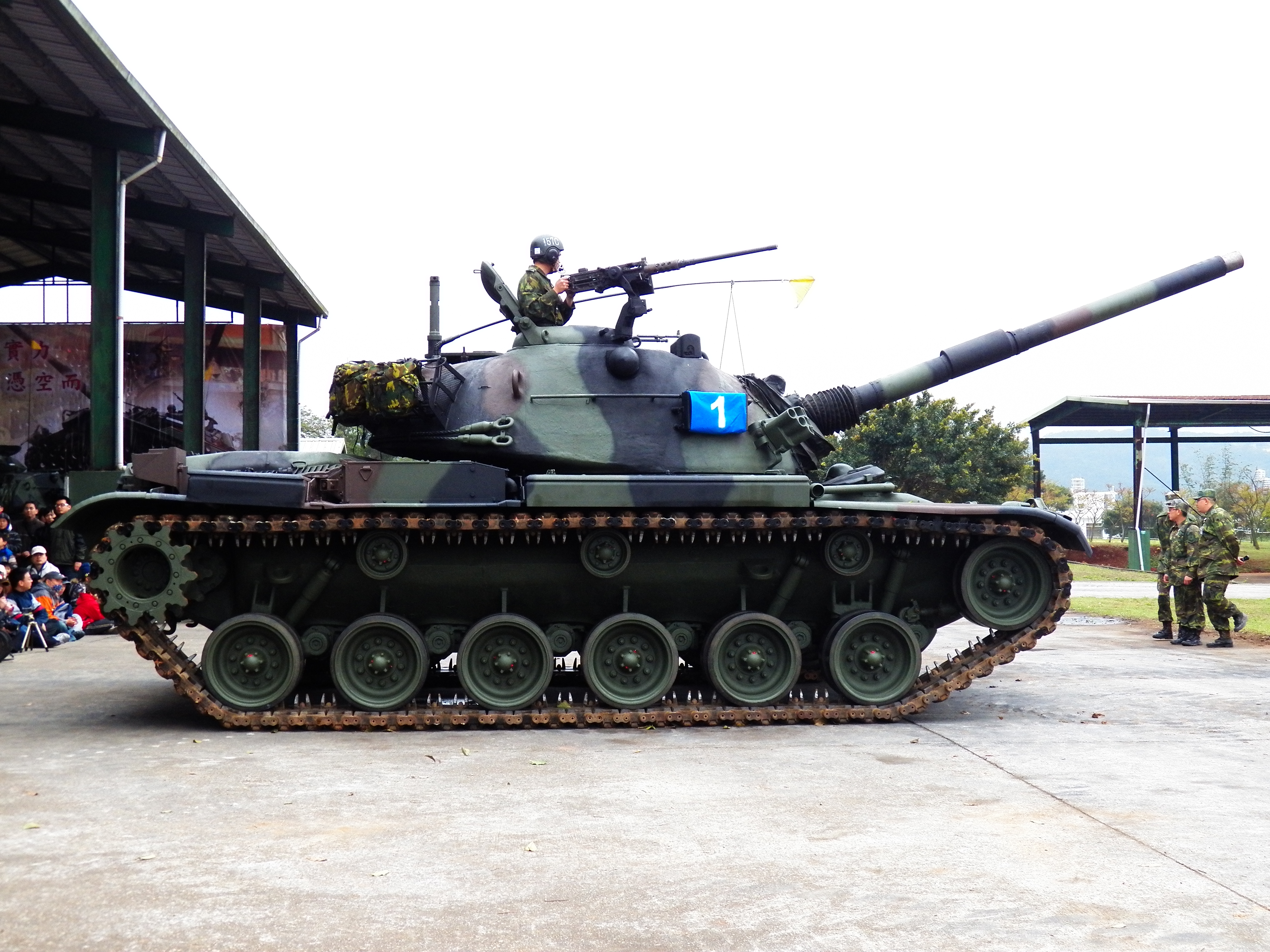 性能展示即將開始的勇虎戰車1號車，乘員均已就位，無線電天線壓低以避風吹。